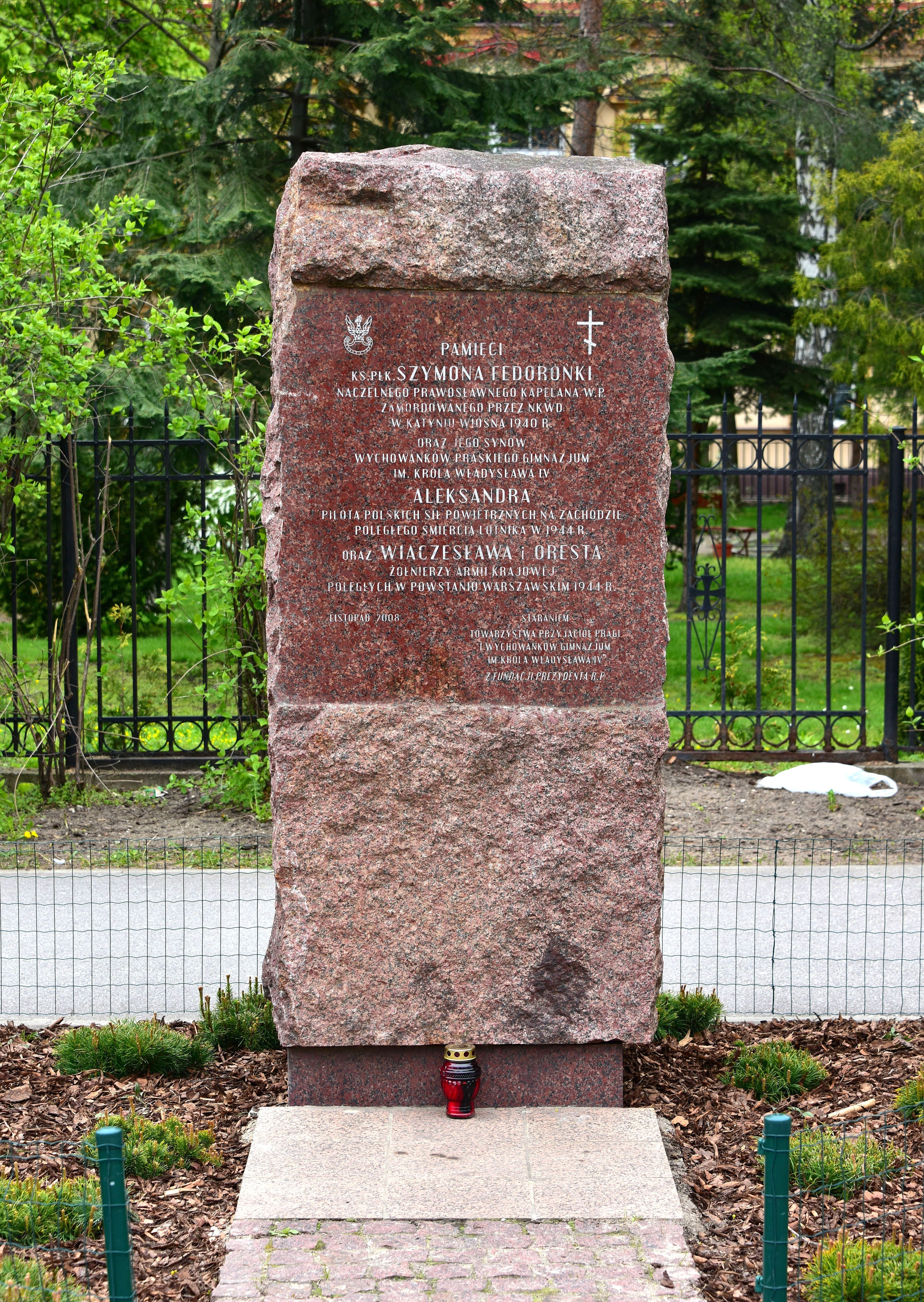 Obelisk upamiętniający Szymona Fedorońkę przy al. "Solidarności" róg Jagiellońskiej w Warszawie